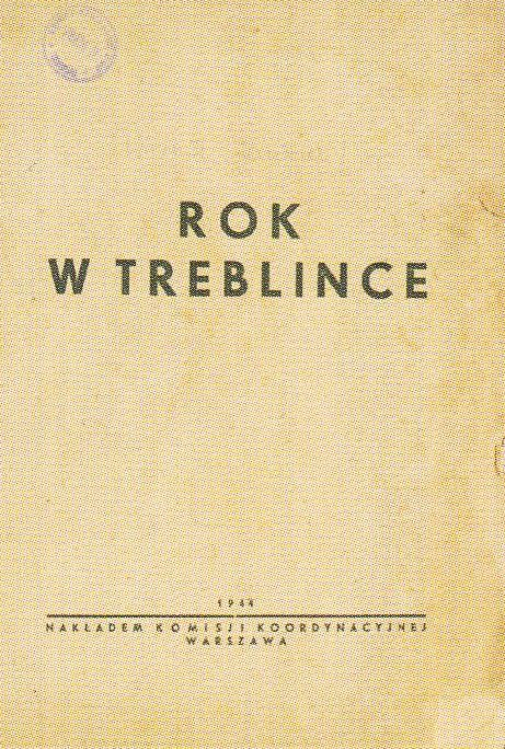 Pierwsza strona relacji Jankiela Wiernika "Rok w Treblince" wydanej w 1944